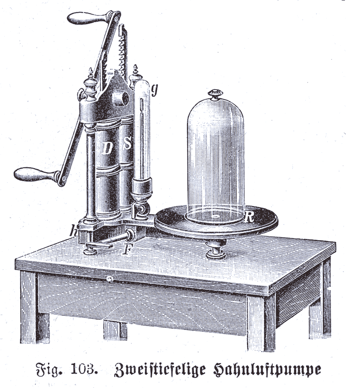 two cylinder tap pump (Zweistiefelige Hahnluftpumpe)